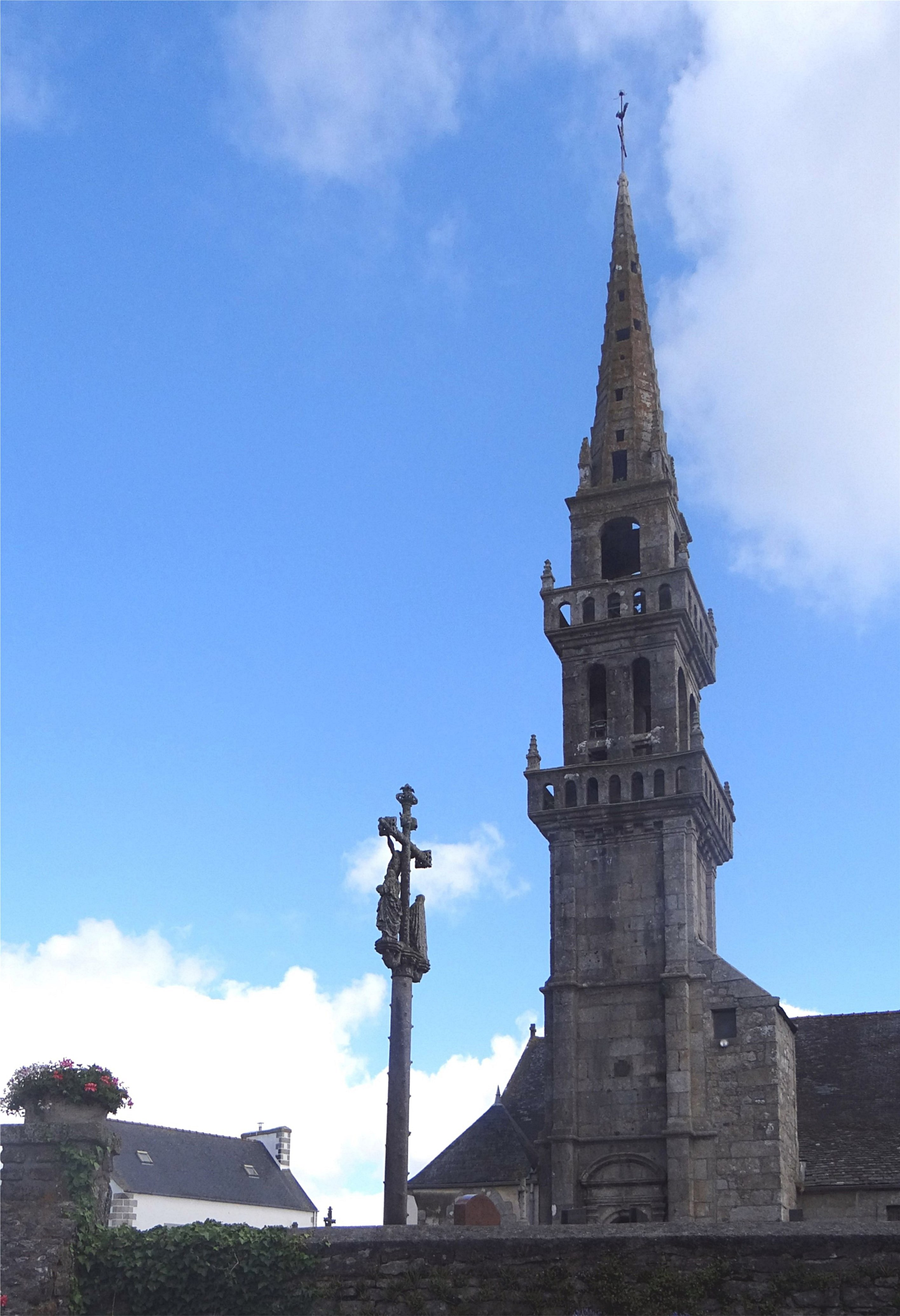 L'église paroissiale de Saint-Vougay, Finistère, France. .